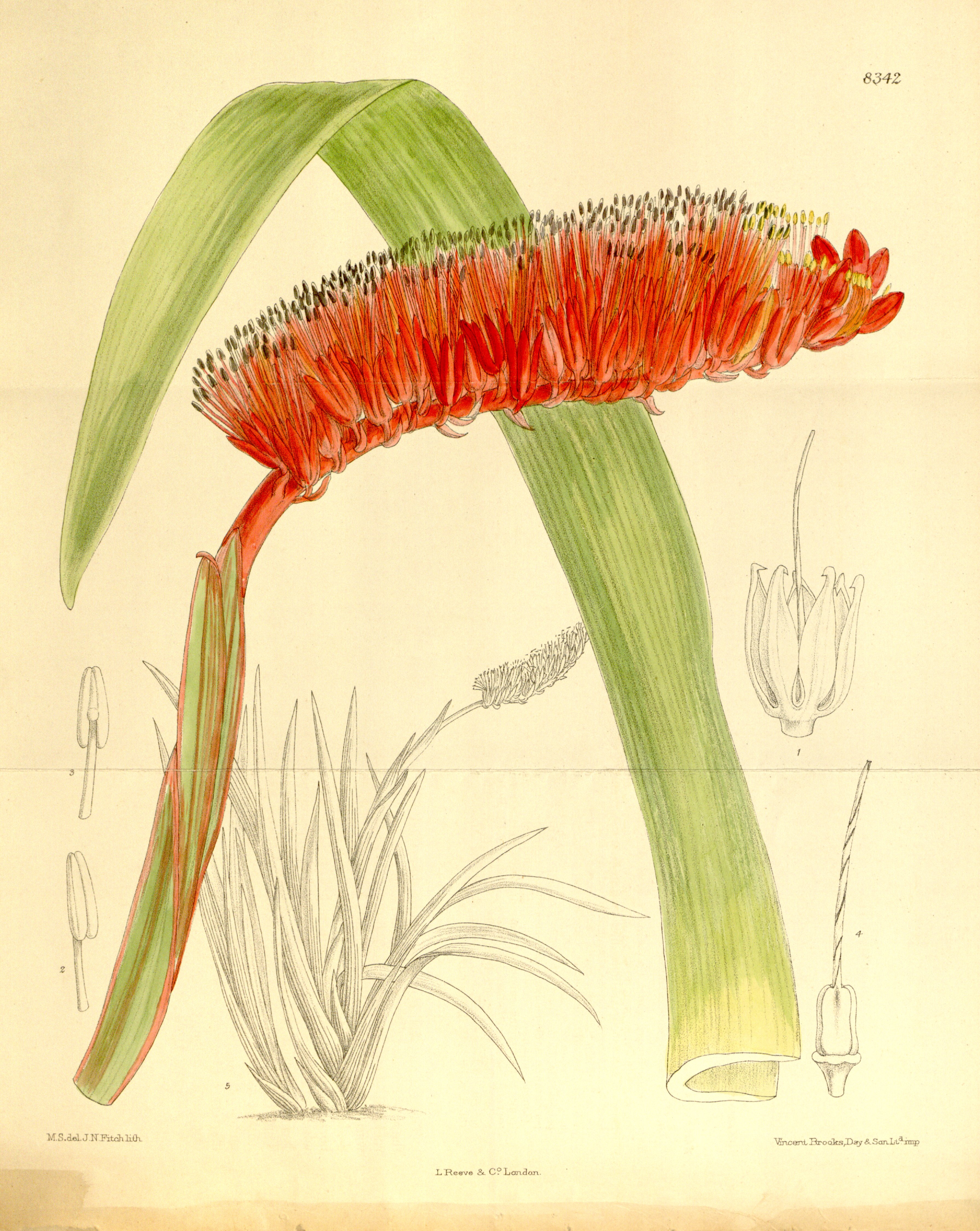 Xeronema moorii, Xeronemataceae